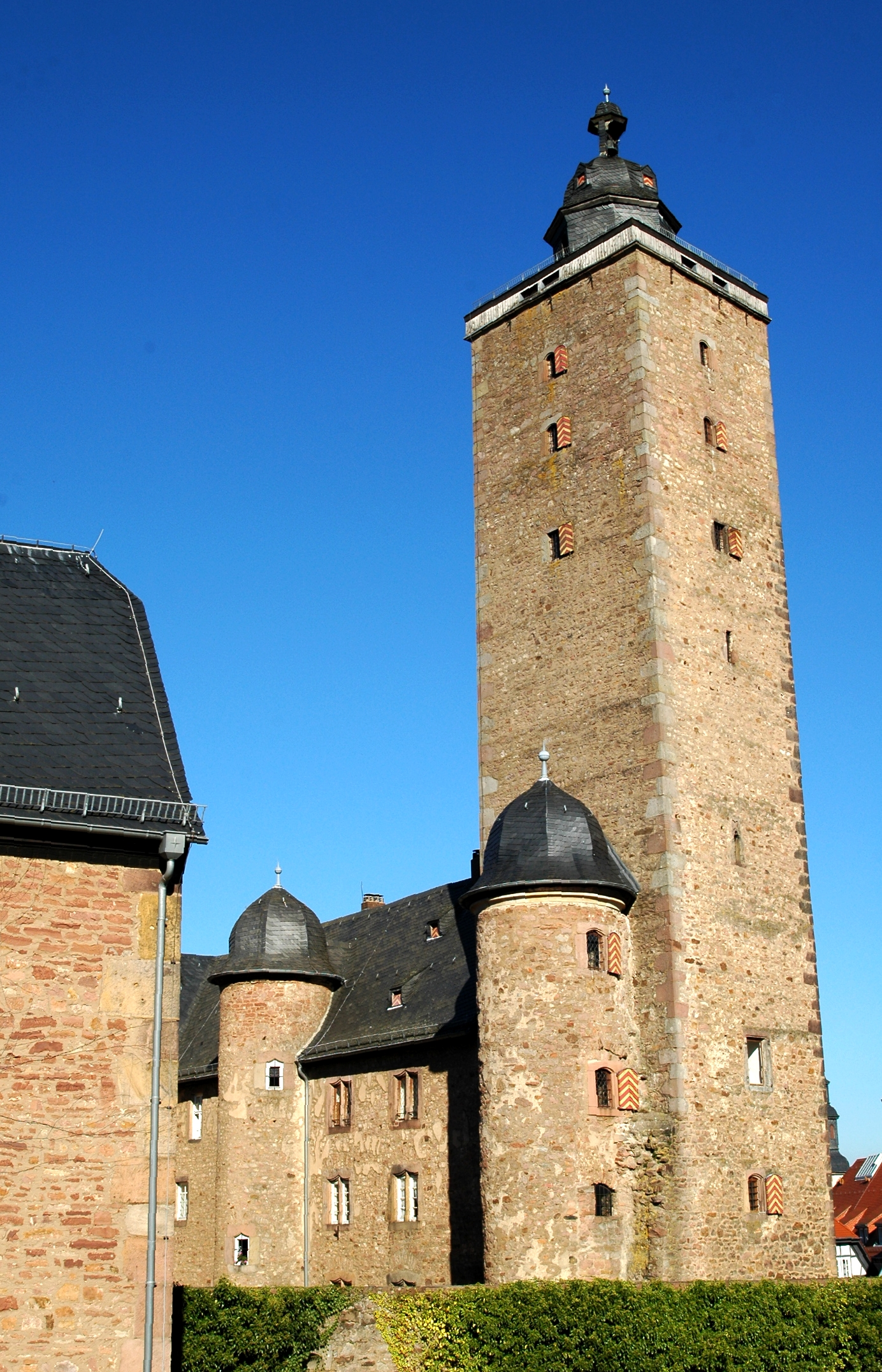 Burg Steinau in Steinau an der Straße, Hessen